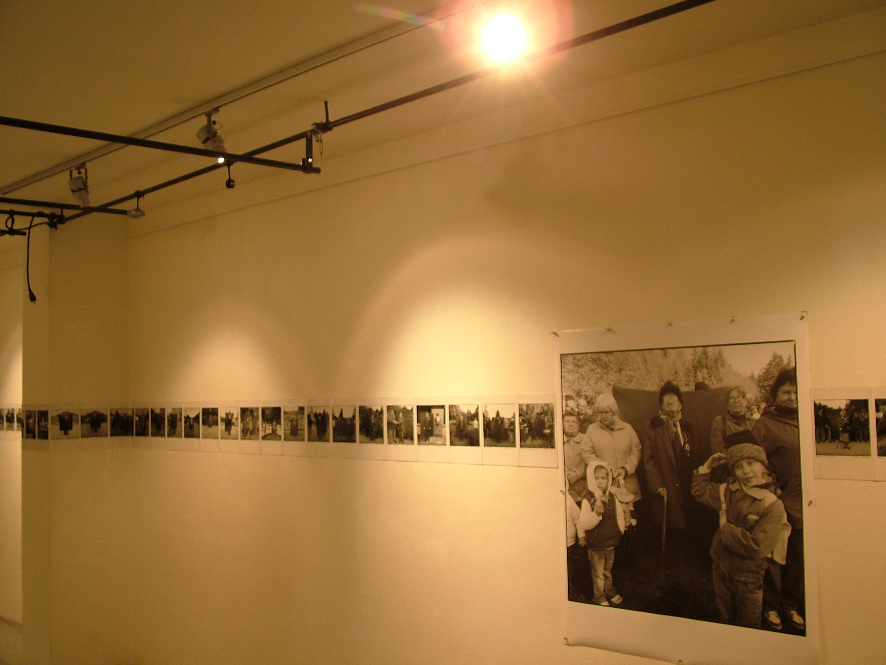 Výstava fotografií, Středoevropský dům fotografie (Stredoeurópsky dom fotografie), listopad - prosinec 2011